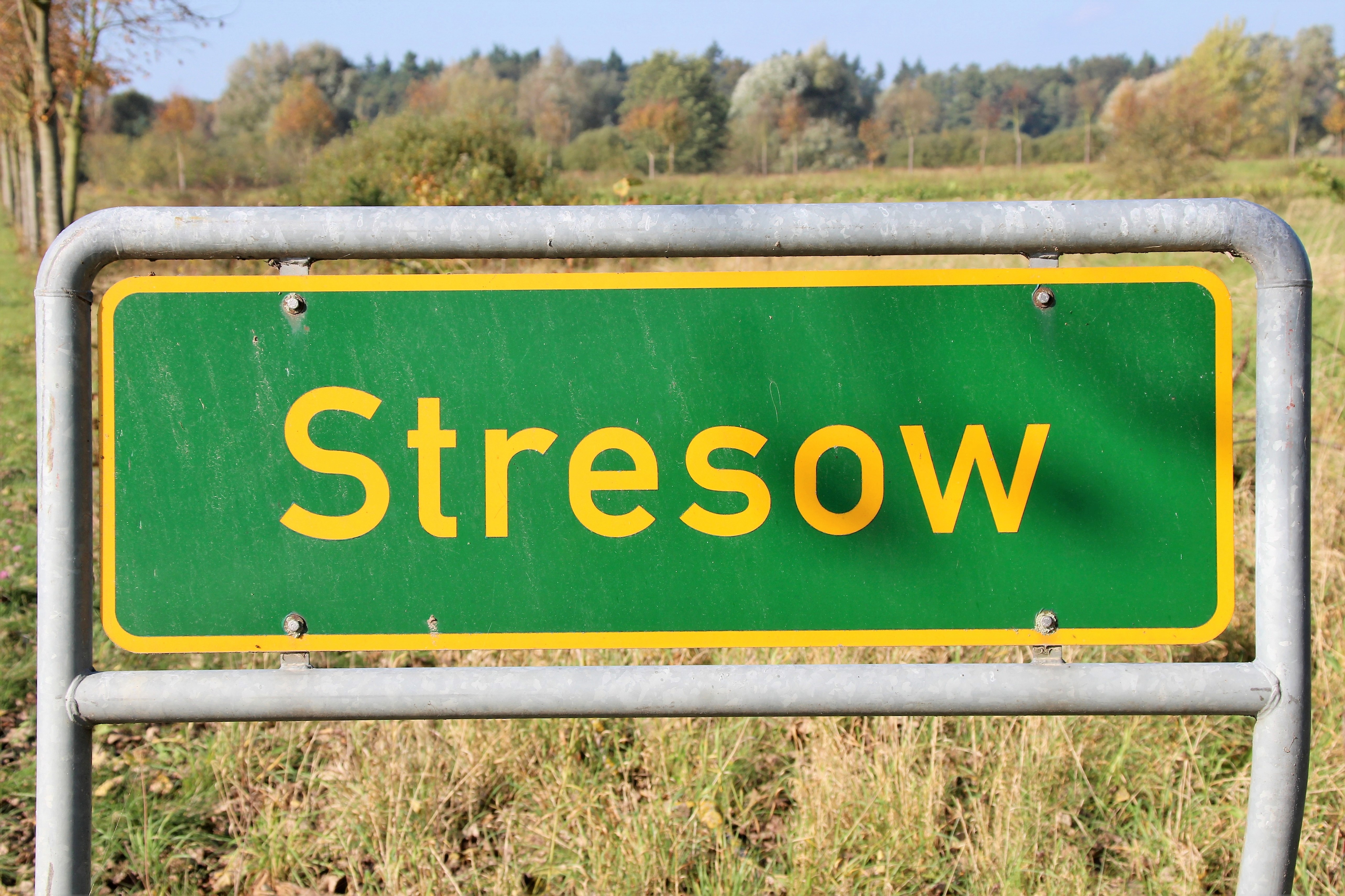 Ortshinweistafel